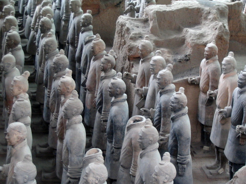 Terakotowe figury żołnierzy z grobowca chińskiego cesarza Qin Shi Huang Di